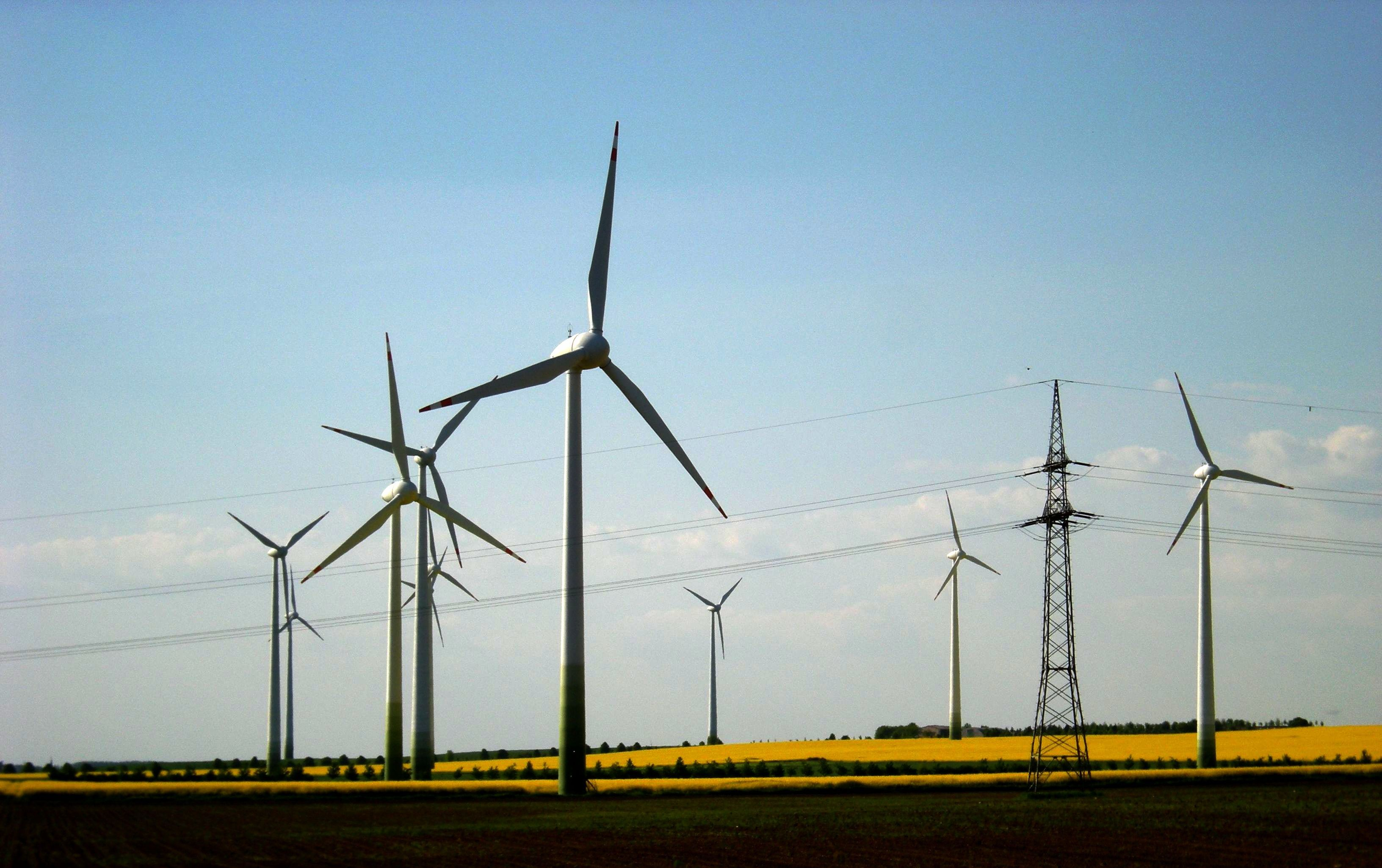 Windpark Walkhügel an der A14 bei Aderstedt in Bernburg, Energiegewinnung mit Windrädern, vorne 110-kV-Freileitungsmast